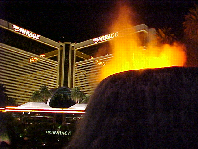 Volcan del Mirage en Las Vegas